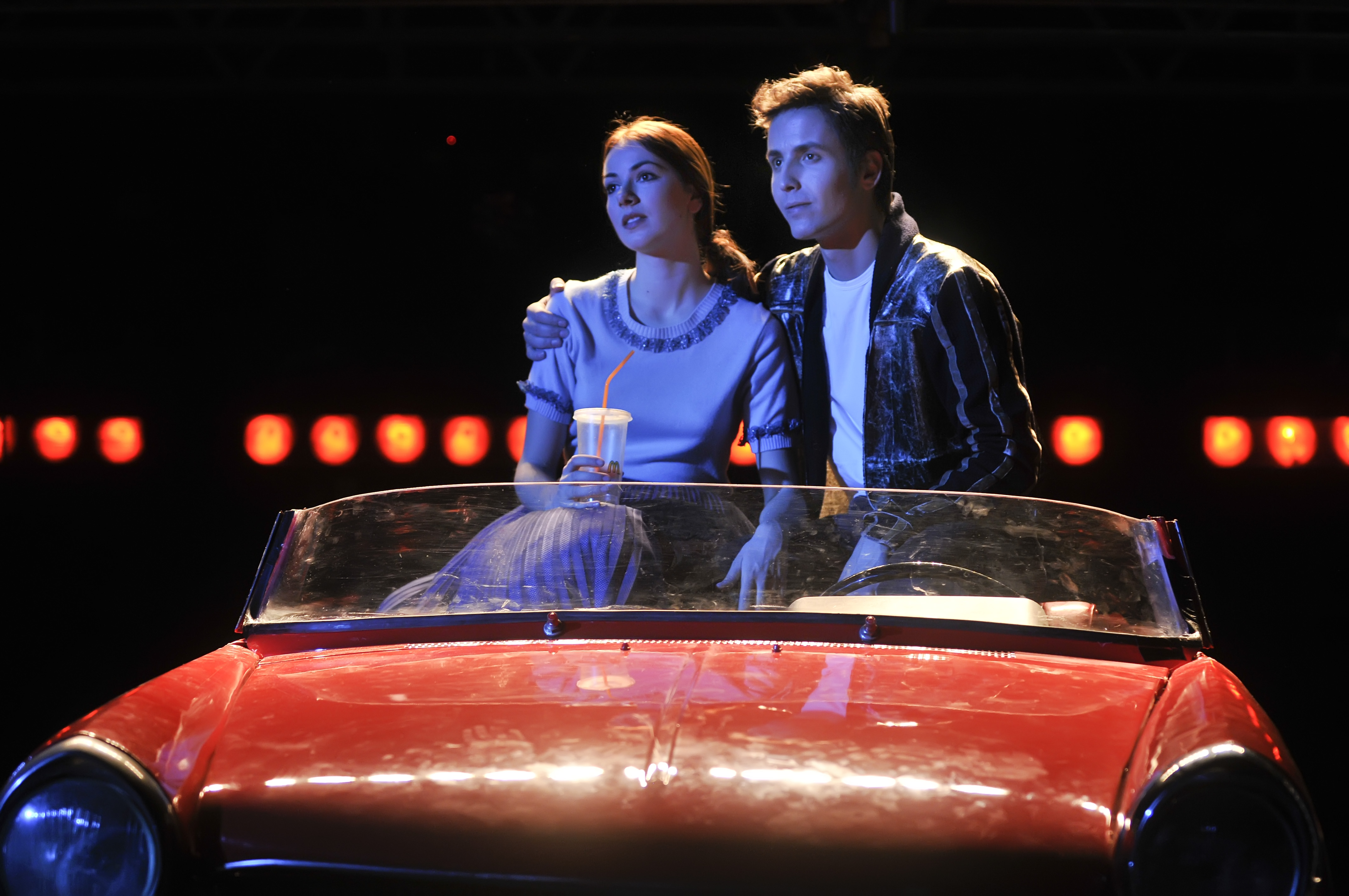 Premijera predstave "Briljantin"